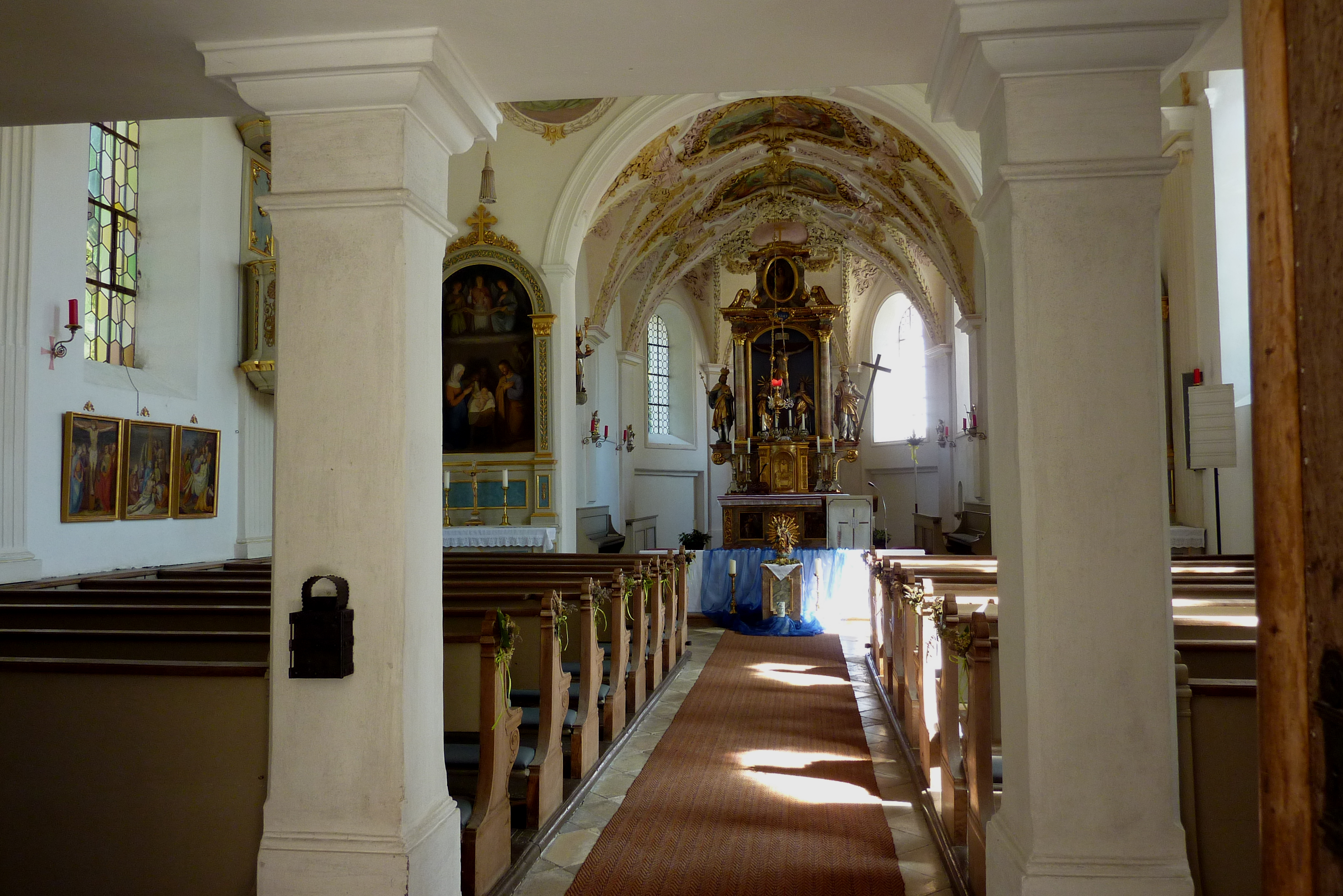 Katholische Filialkirche Heilig Kreuz in Holzhausen (Alling) im Landkreis Fürstenfeldbruck (Bayern/Deutschland), Innenraum